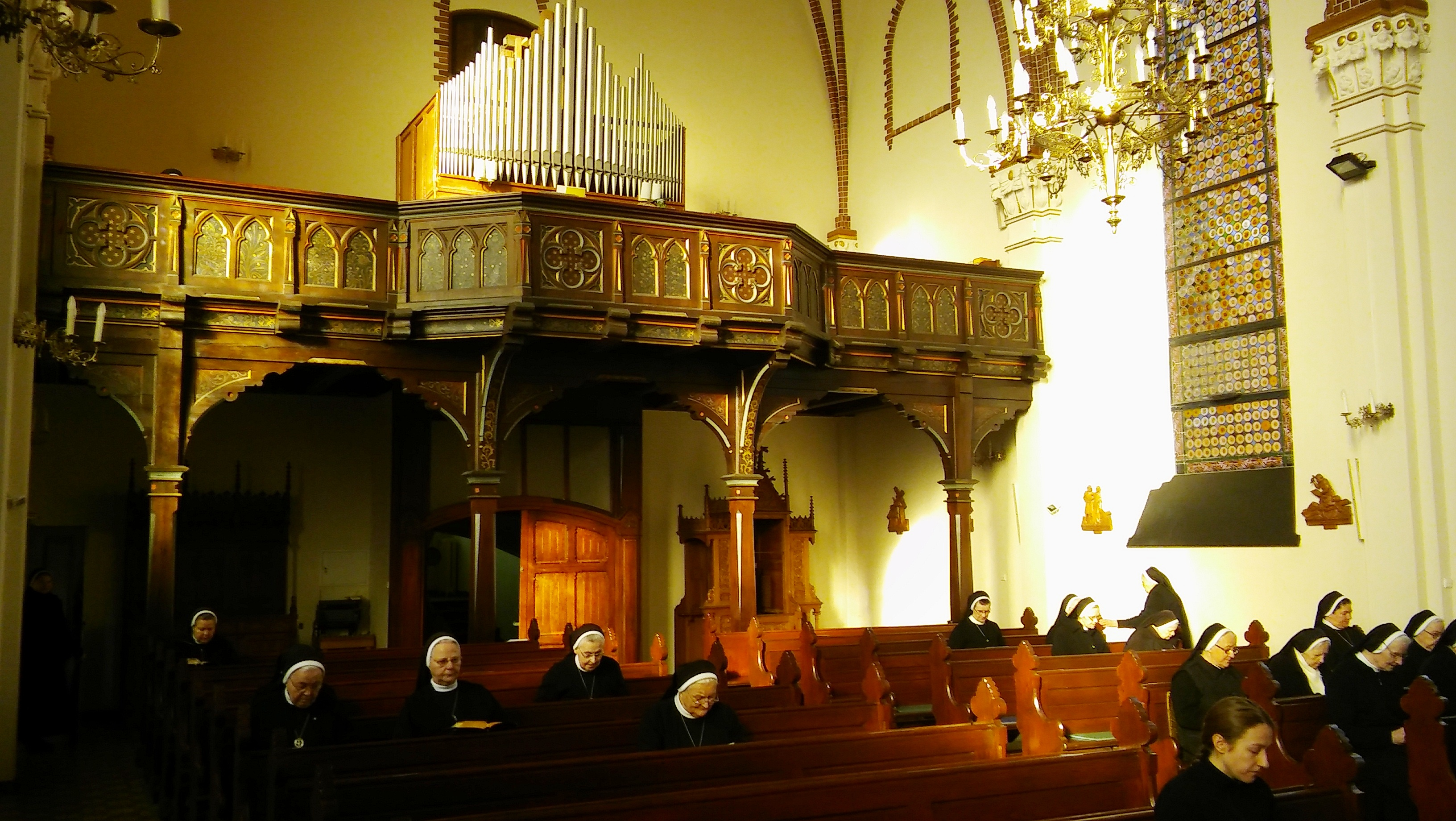 Kaplica „Regina Coeli” w Braniewie 2018